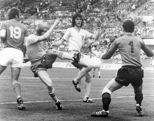 ADN-ZB-AP-Tele-15.6.74-ma-BRD-Düsseldorf: X. Fußball-Weltmeisterschaft-1. Finalrunde, Gruppe 3: Schweden - Bulgarien 0:0- Der Schwede Roland Sandberg (2.v.l.) schießt aus kurzer Tordistanz ab, doch Torwart Rumjantscho Goranow (rechts) wird nicht überwunden. Links Kiril Iwkow (Nr.19-beide Bulgarien). Bildmitte Ralf Edström (Schweden).